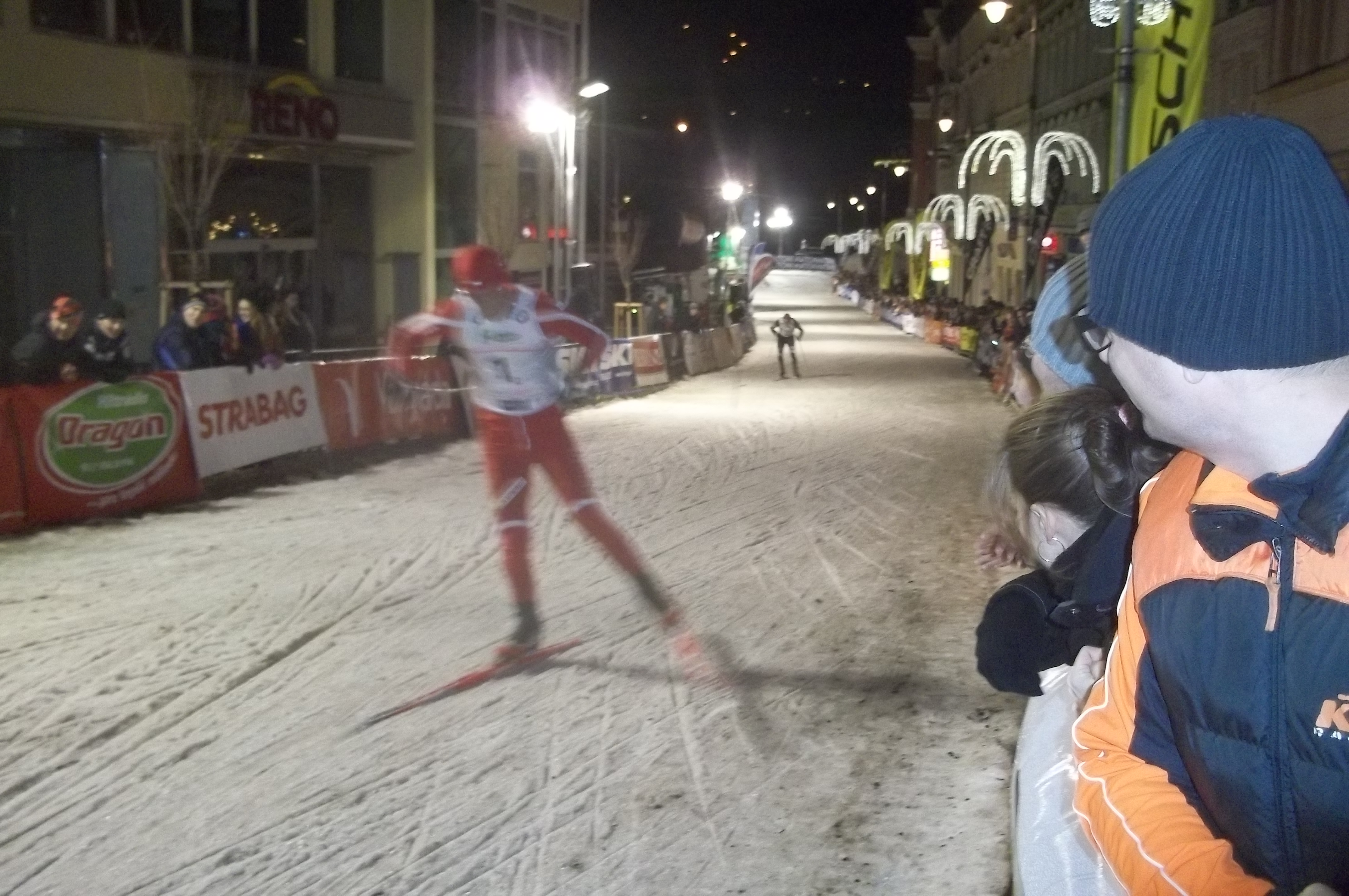 Karlovy Vary